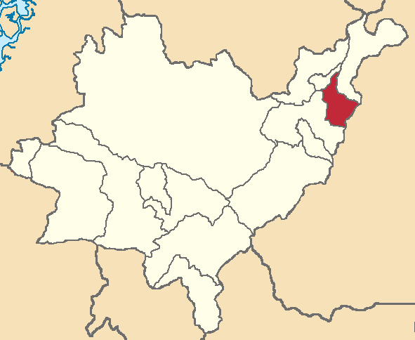 Mapa localizacor del cantón en Azuay, Ecuador